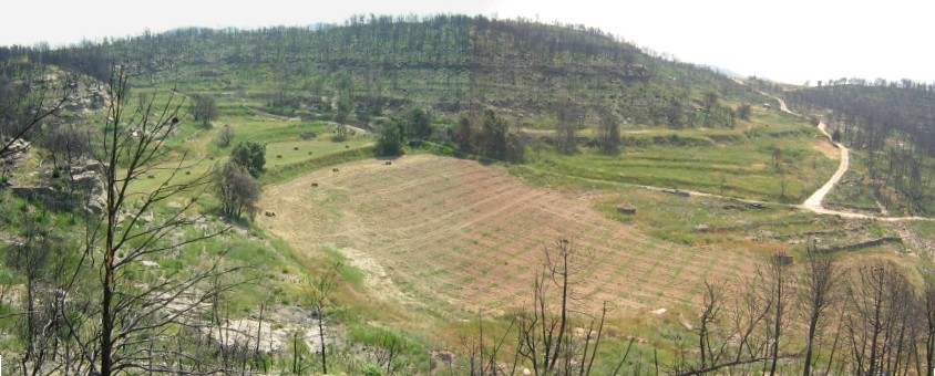 El Pla de Trullars (Monistrol de Calders, Moianès)